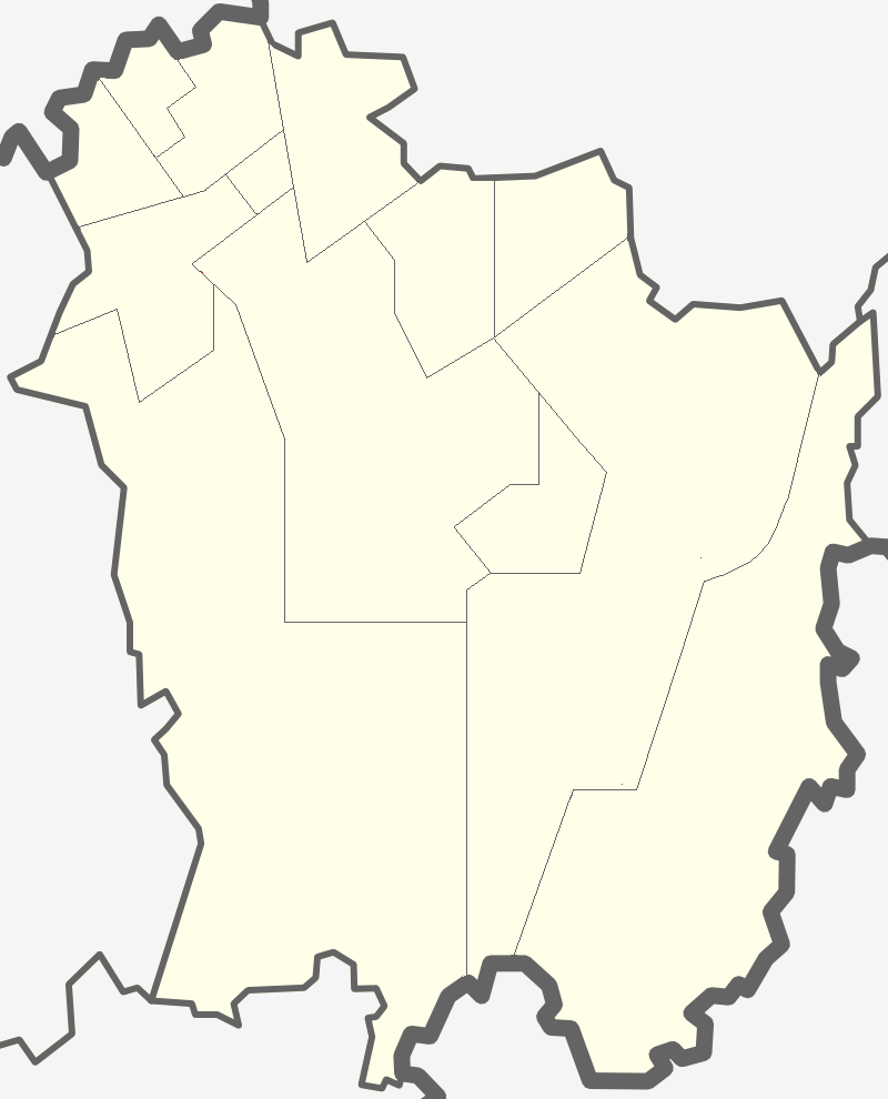 Карта Тосненского района Ленинградской области с делением на муниципальные образования.